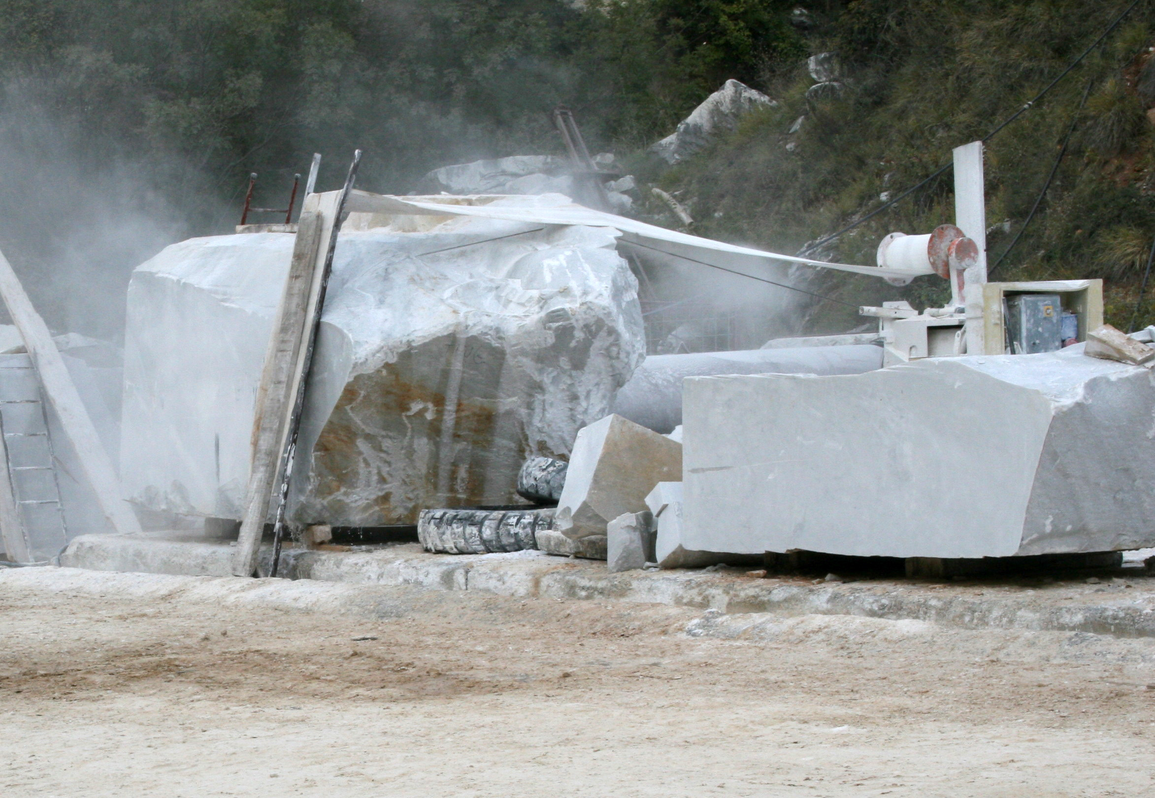 Blockseilsäge [Location=?]